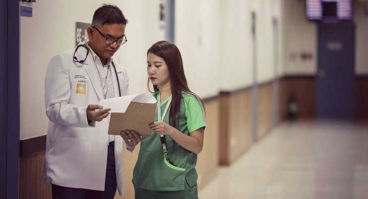 Hospital de la India. Turismo de Salud